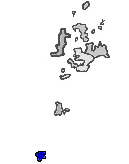 台灣省澎湖縣七美鄉KaurJmeb於2005年2月7日為編輯澎湖縣zh:七美鄉所繪